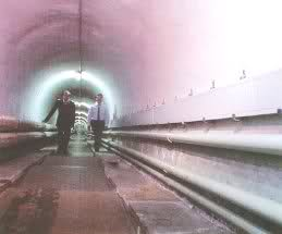 Tunnel relativo al bunker presente nella Base NATO Venda.